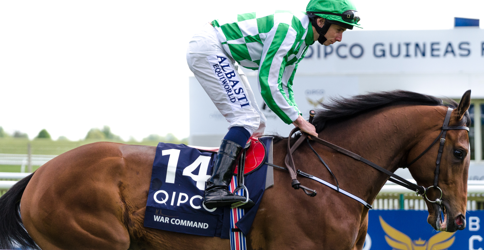 Newmarket, 03/05/14